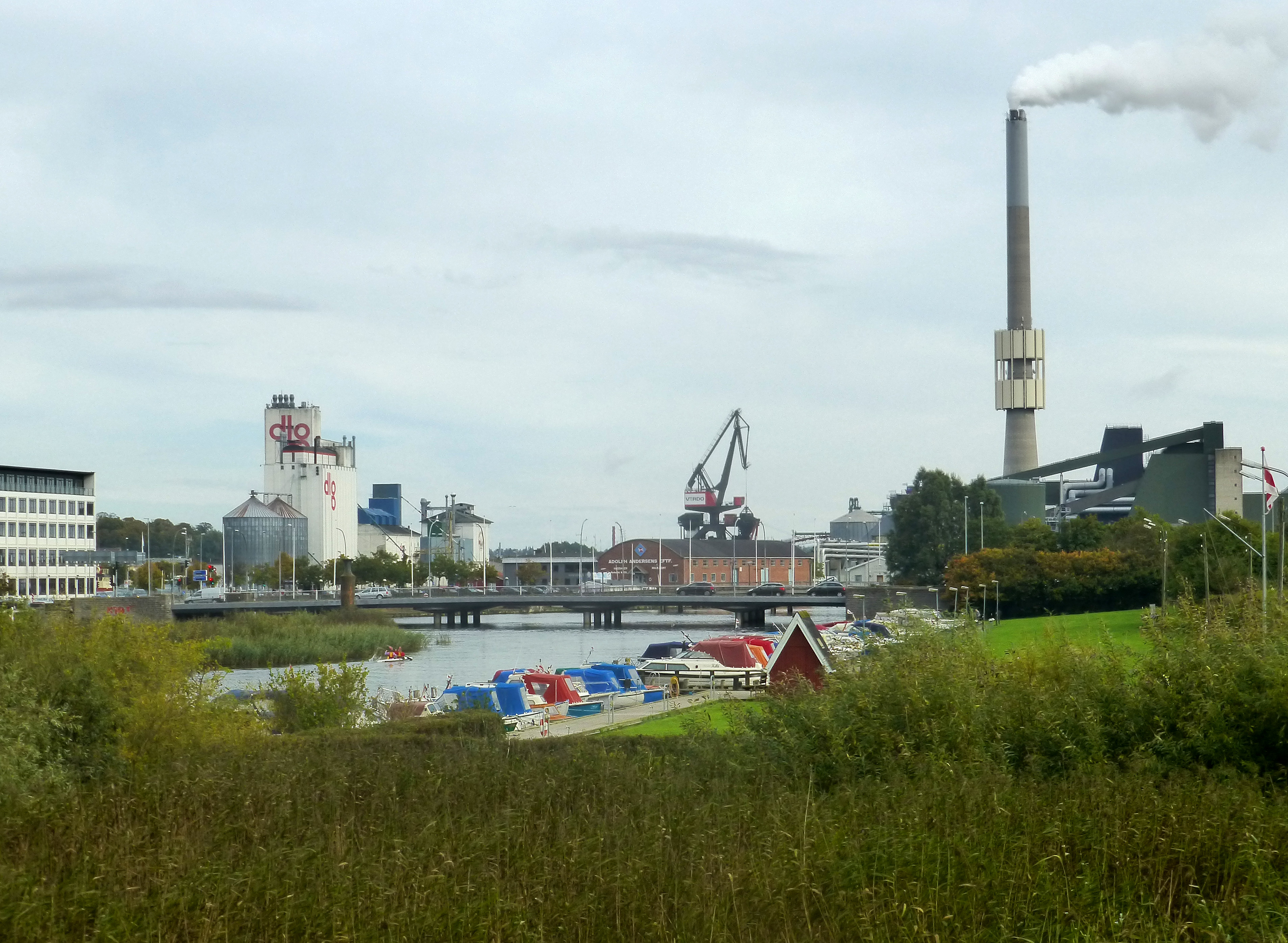 Randers Bro set fra sydvest